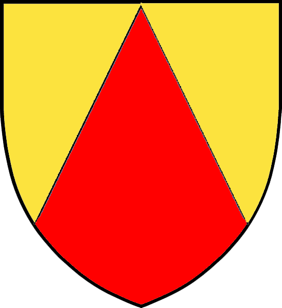 Vapensköld för frälsesätten Sture (spets nedifrån)